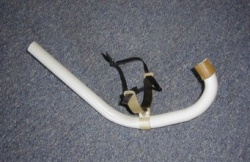 Finswimming snorkel